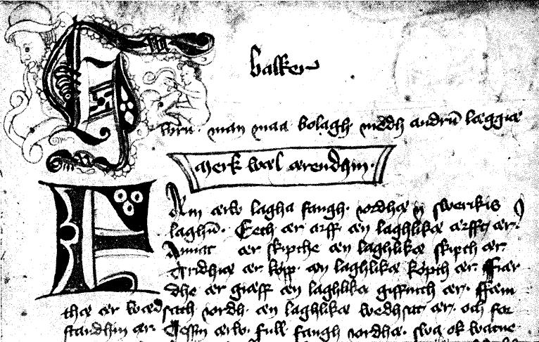 Faksimil (något förminskad) av början till jordabalken i Magnus Erikssons landslag, efter en pergamentshandskrift från mitten av 1400-talet, i Kungliga biblioteket, Stockholm. (Översta raden utgör slutet av balkens register.)